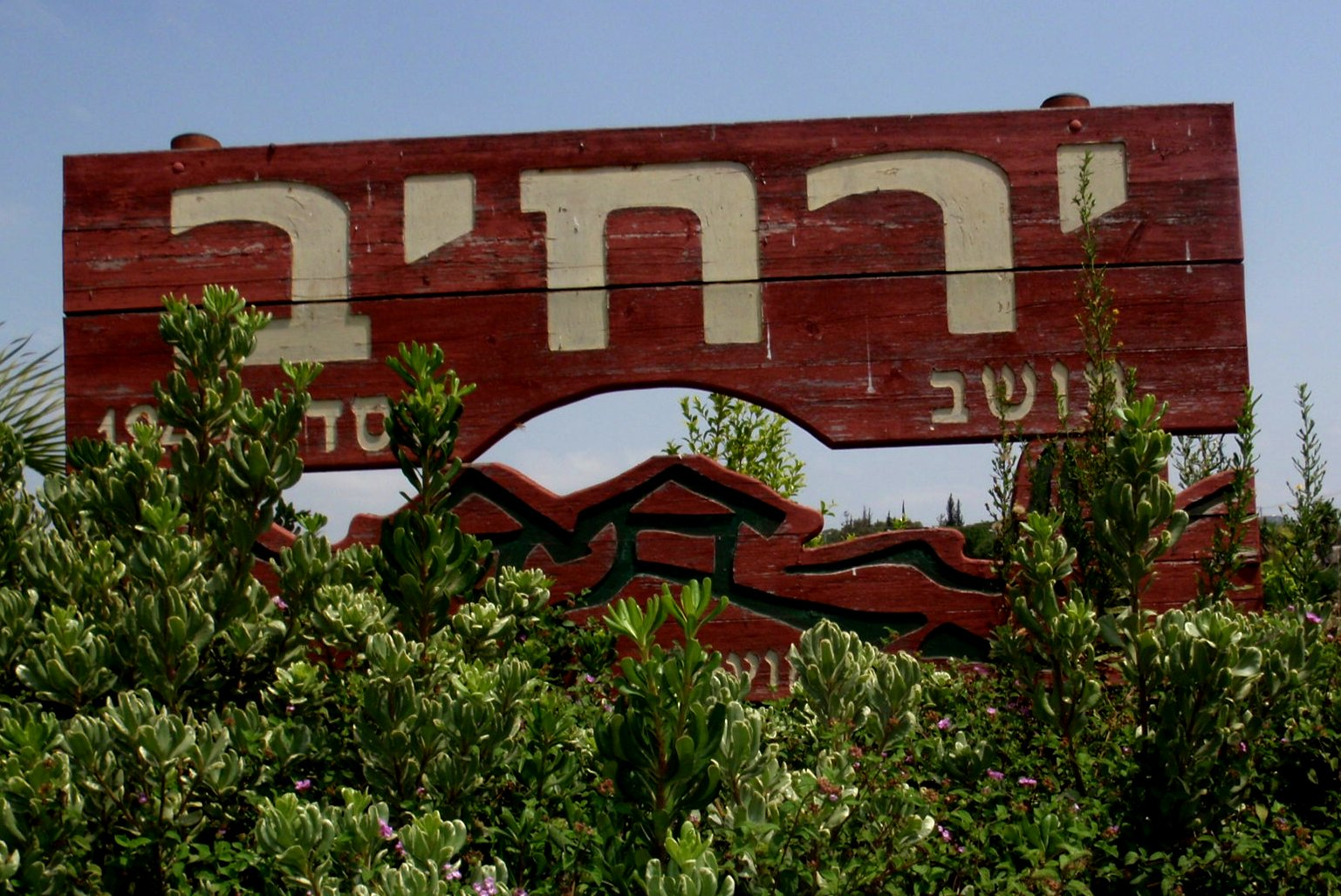 ירחיב שלט הכניסה למושב